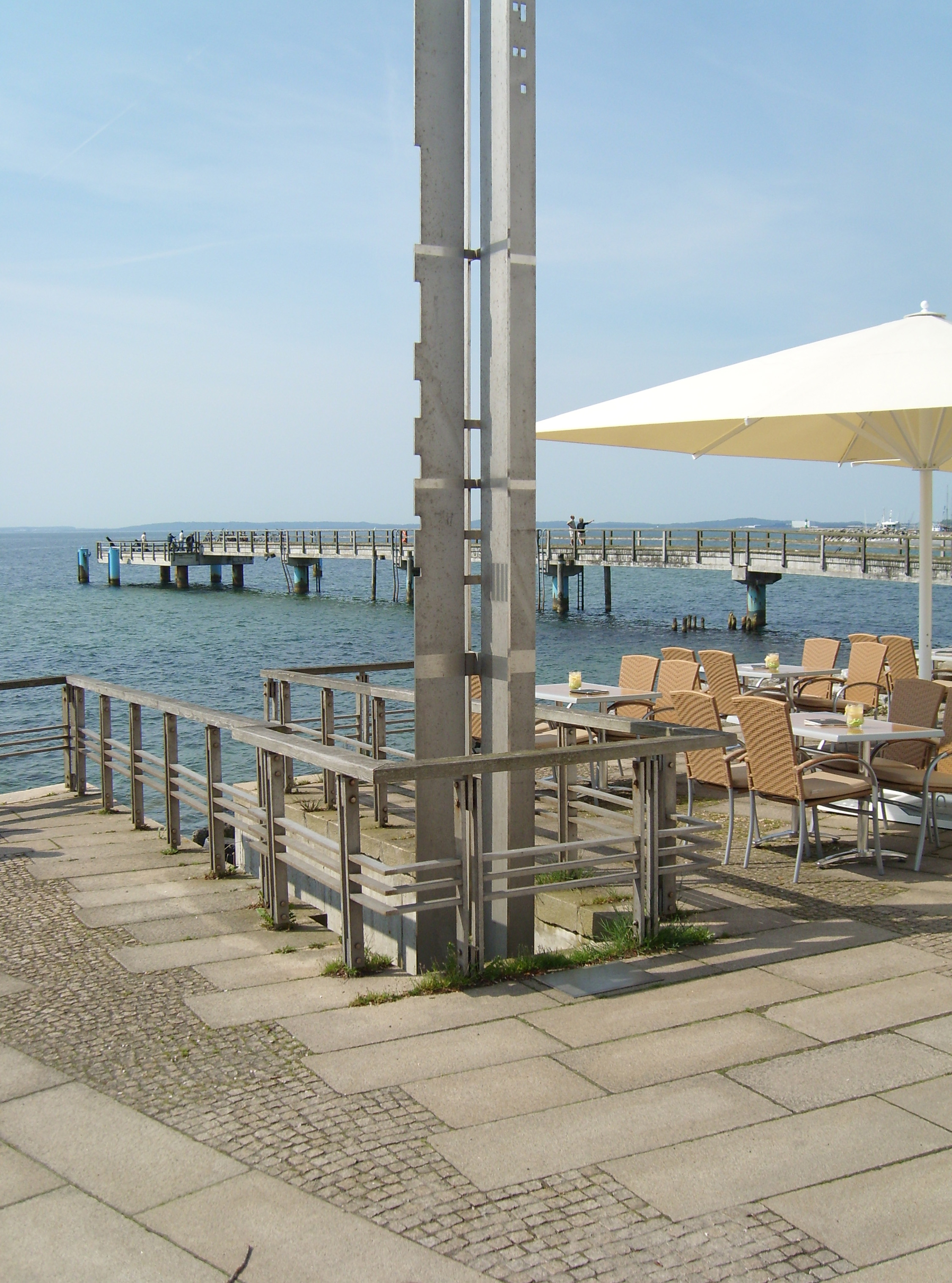 Mündung des Steinbaches in die Ostsee bei Sassnitz. Seit der Neugestaltung der Strandpromenade 1995 ist die Mündung wieder freigelegt und wird durch die Metallstele markiert.